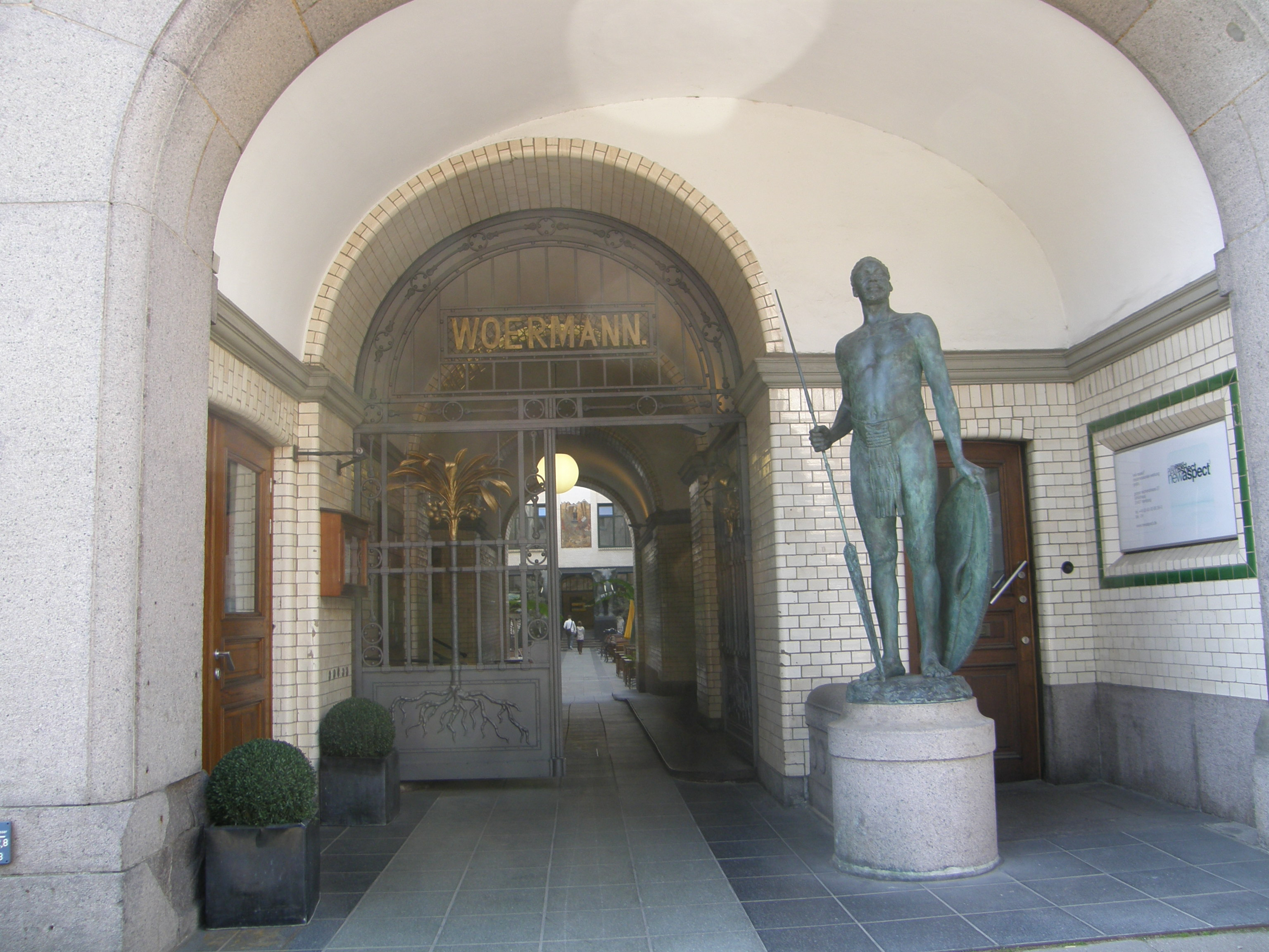 Eingang des Woermannhaus - Kaufmannshaus Hamburg AfrikahausThis is a photograph of an architectural monument.